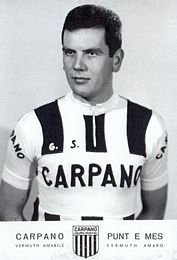 Ottavio Cogliati